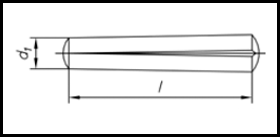 DIN 1471